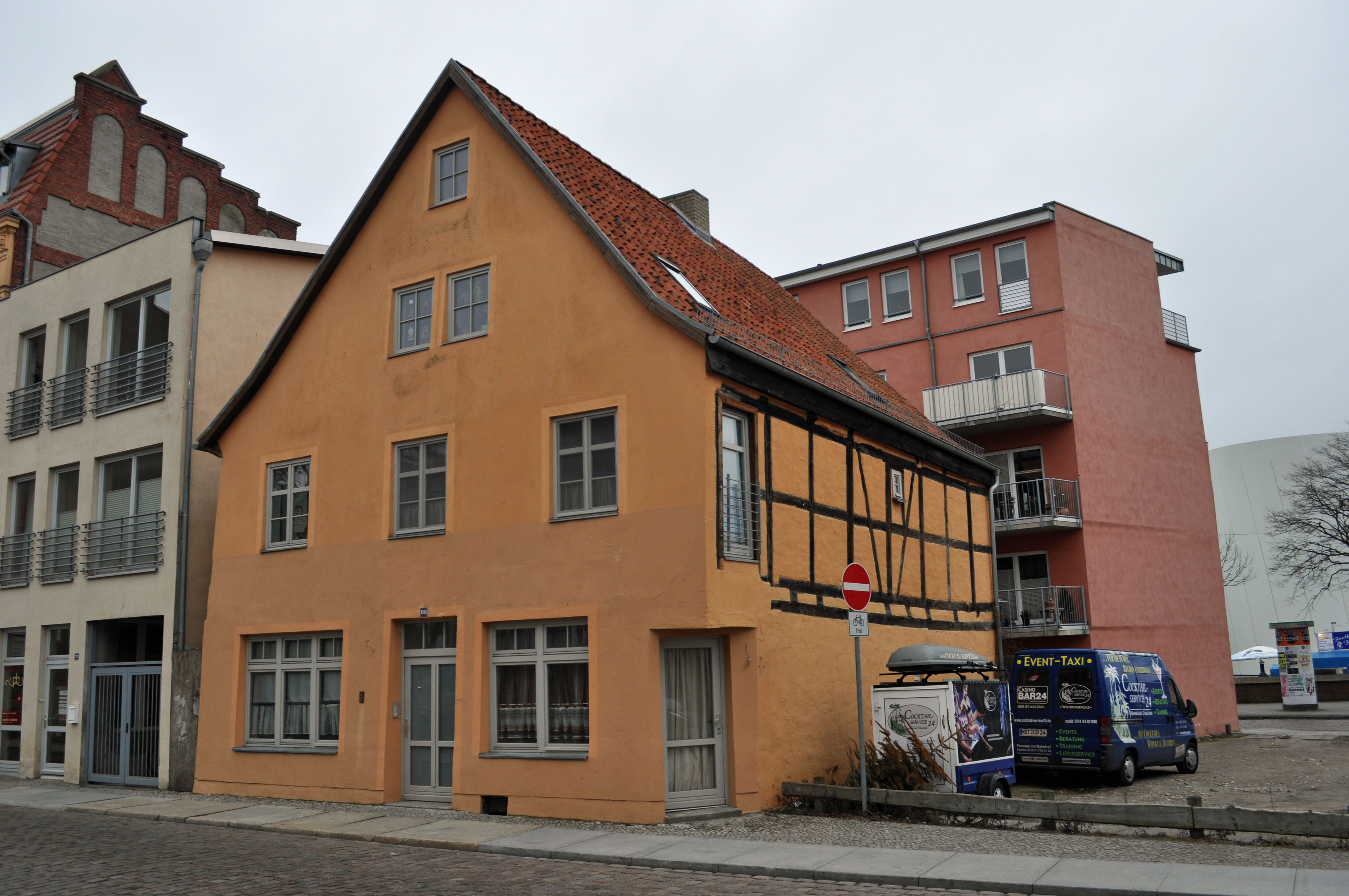 Gebäude bzw. Gebäudedetail in Stralsund. Straße und Hausnummer siehe Dateiname.